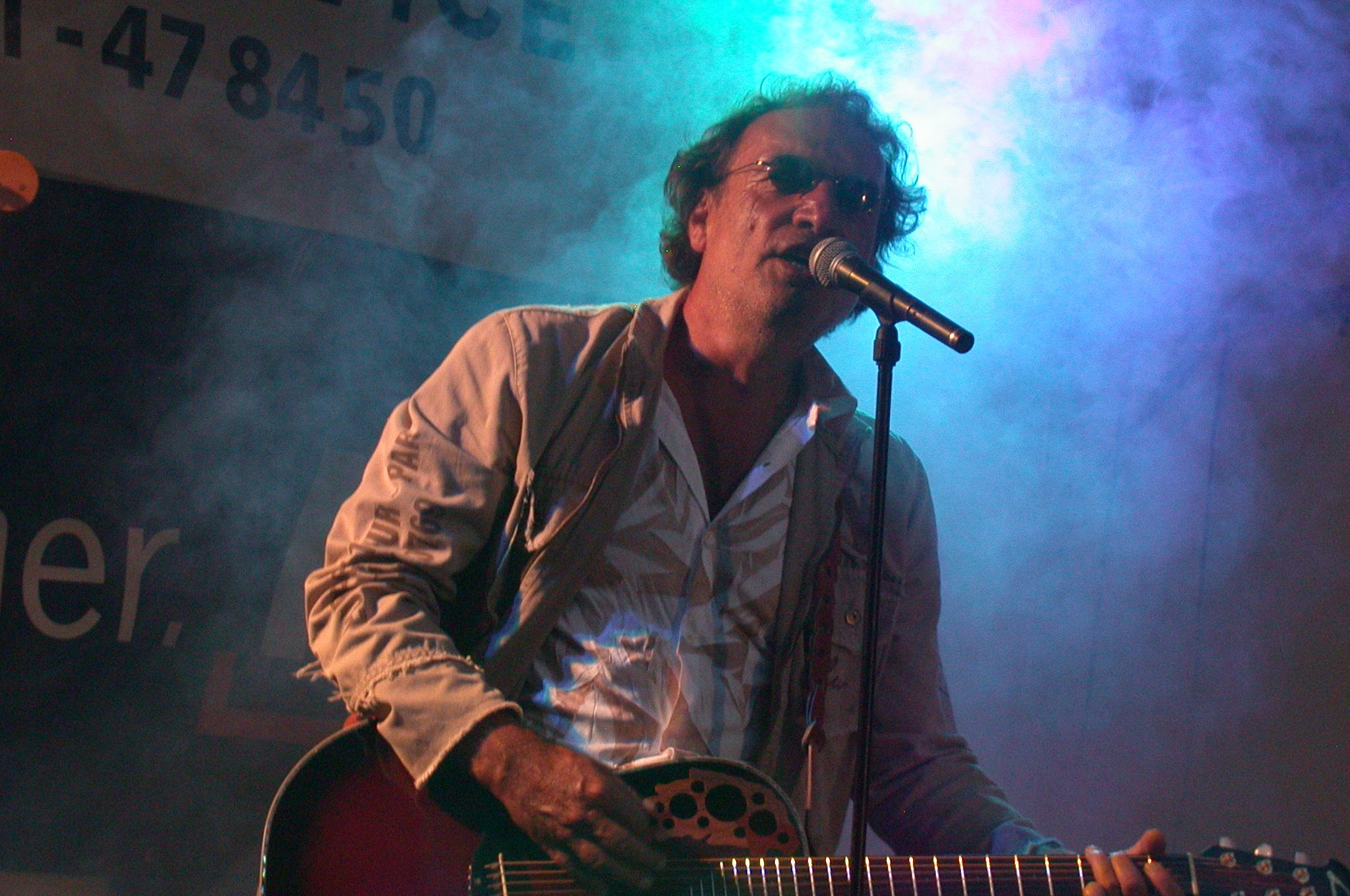 Tiger B. Smith Live